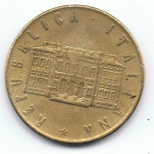 200 Lire Italiane - Giornata Mondiale dell'Alimentazione - Villa Lubin